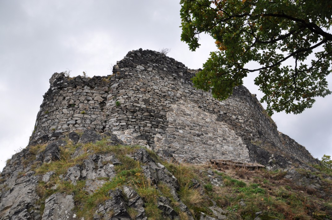 Burg Blansko (Blankenstein), Mírkov, Tschechien